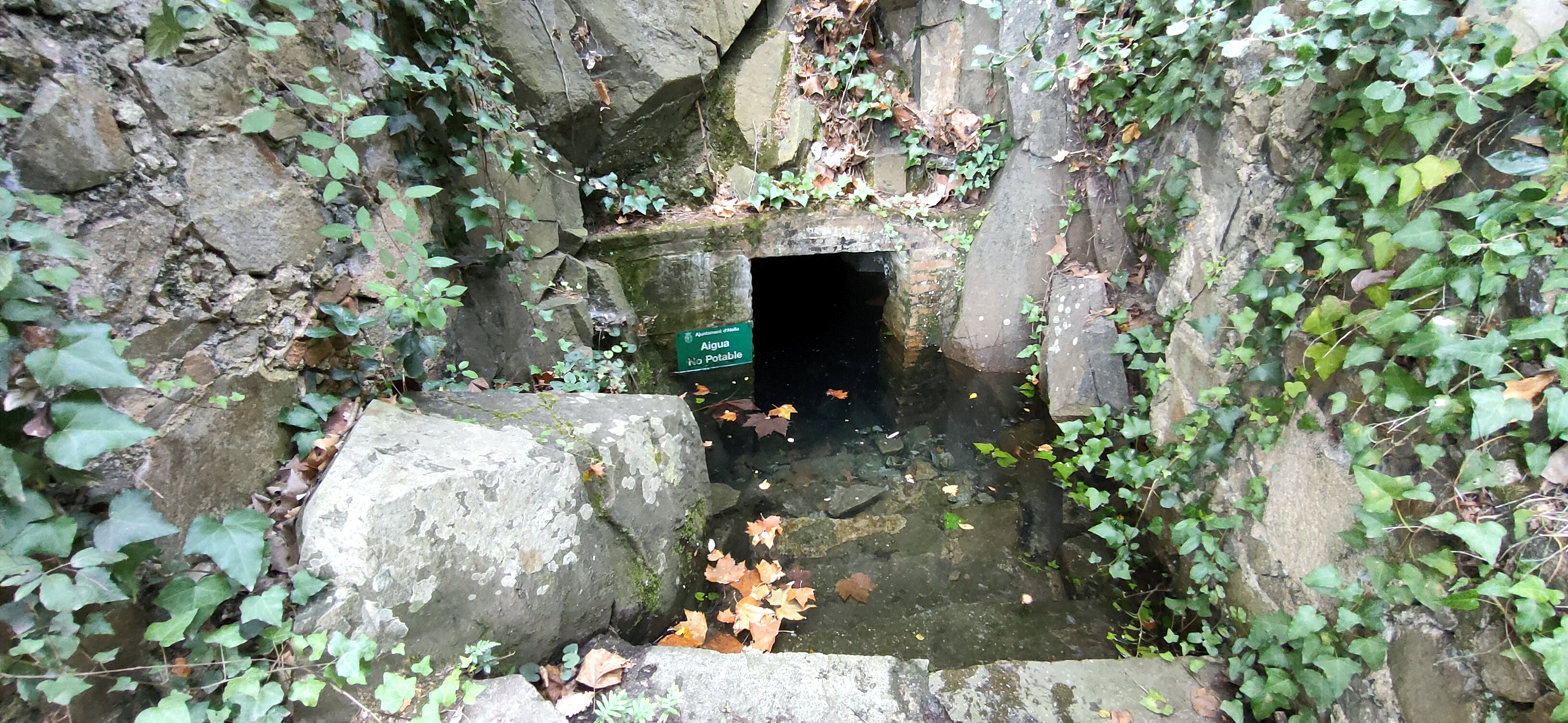 Font de l'Esquerda (Alella), agost 2020